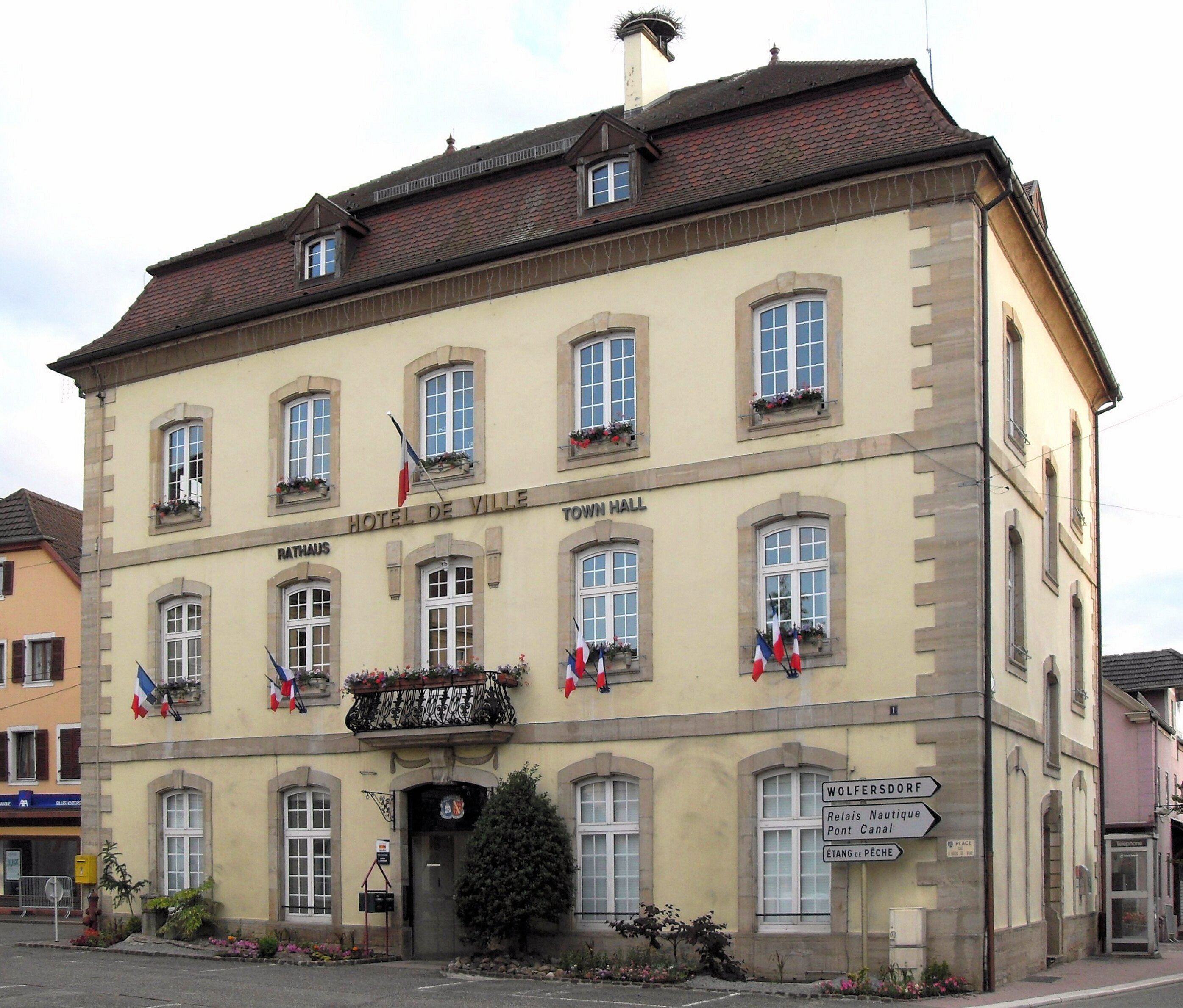 L'hôtel de ville de Dannemarie